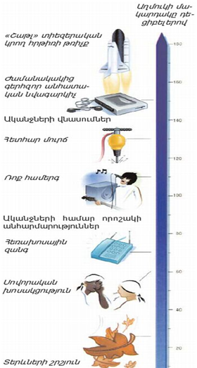 Ձայնային ալիքներ